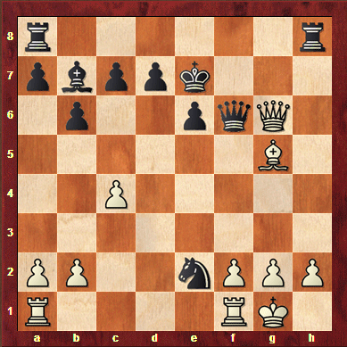 El mate Anastasia se caracteriza por la combinación del caballo que cierra los escapes y el ultimo movimiento de una torre o dama que ataca en columna.